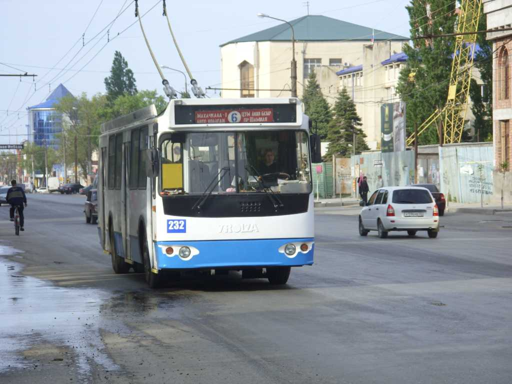 Троллейбус ЗиУ-682Г-016.05 № 232 на проспекте Кирова в Махачкале.